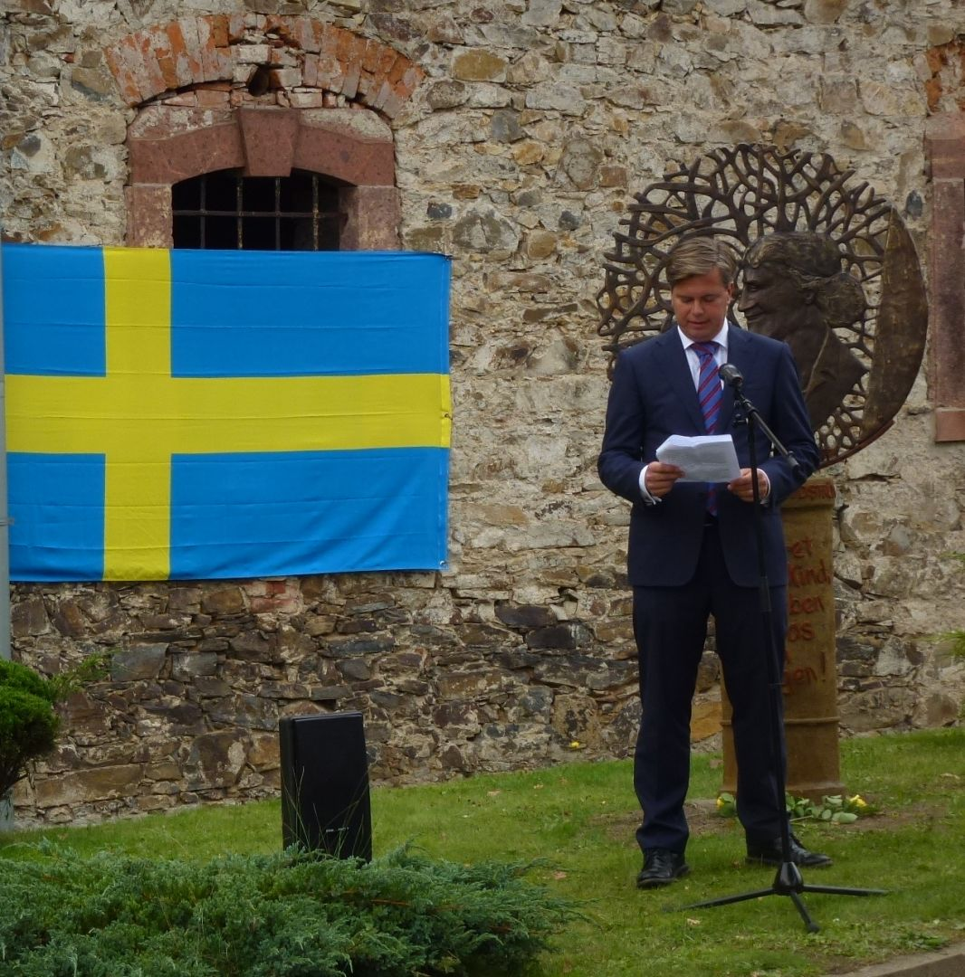 Stv. Botschafter Staffan Hemrå bei der Einweihung des Brändström-Denkmals vor Schloss Neusorge